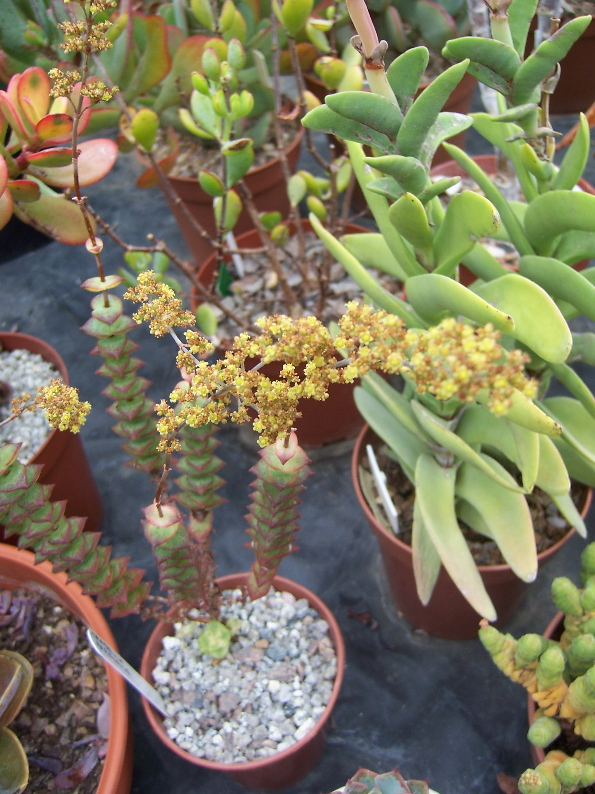 Crassula Perforata Varigata in flower